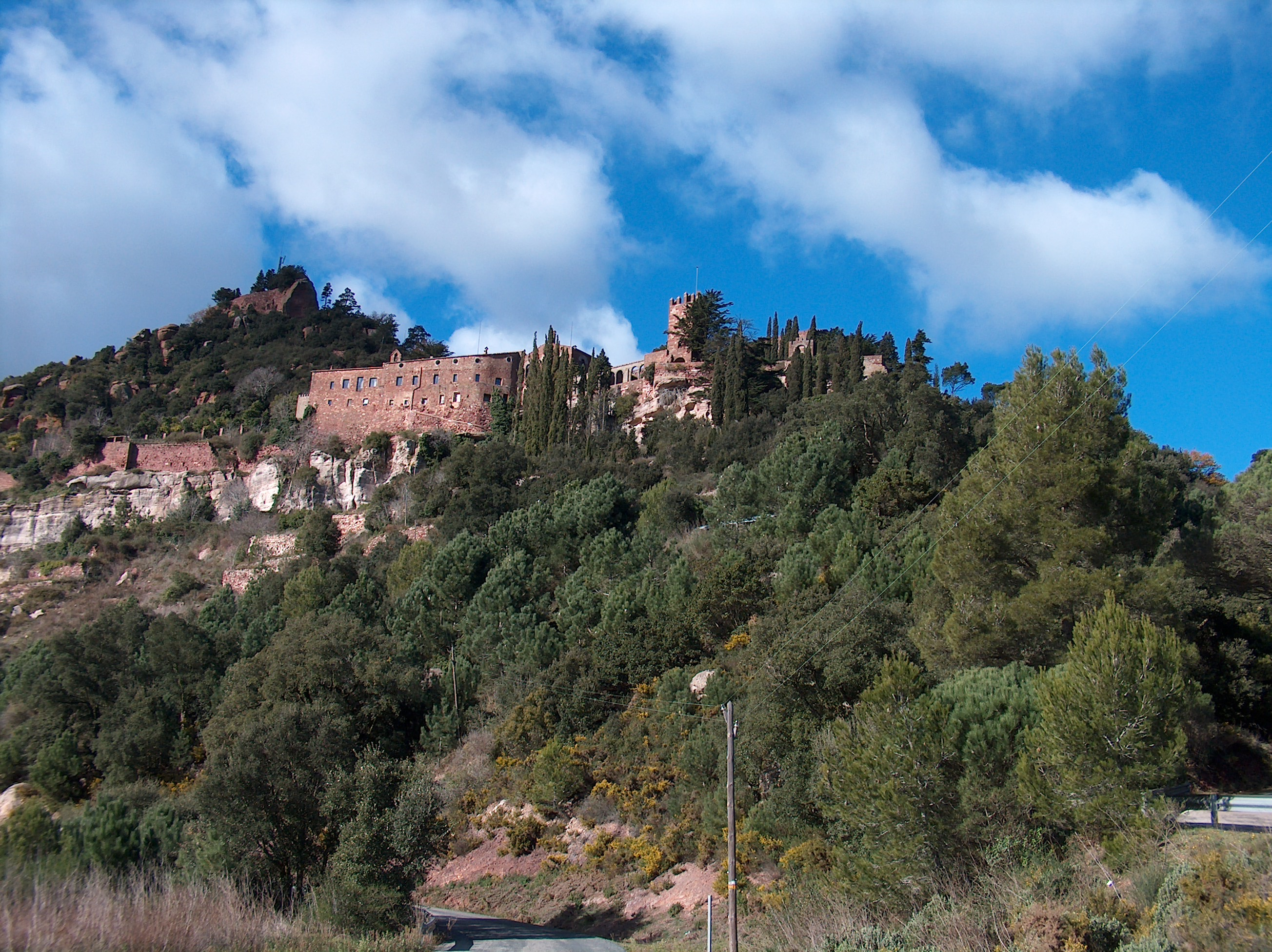 Castell monestir d'Escornalbou (Riudecanyes)